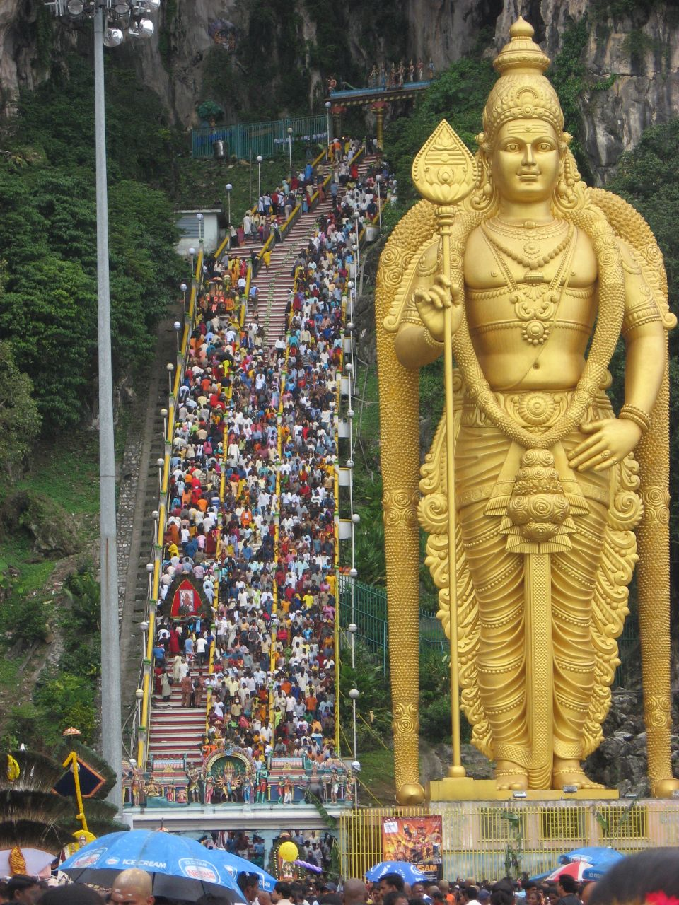 Batu Caves Thaipusam 2007